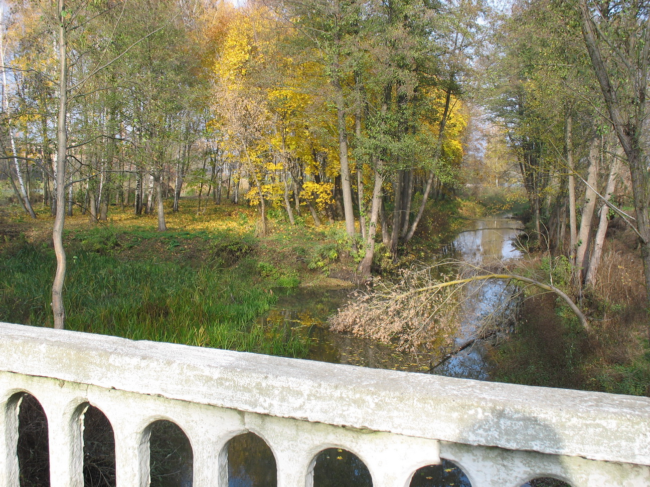 Чернігівська обл. Менський р-н, с. Киселівка. Центр села. Вигляд від автошляху на річку Мена в урочищі "Рокитне"